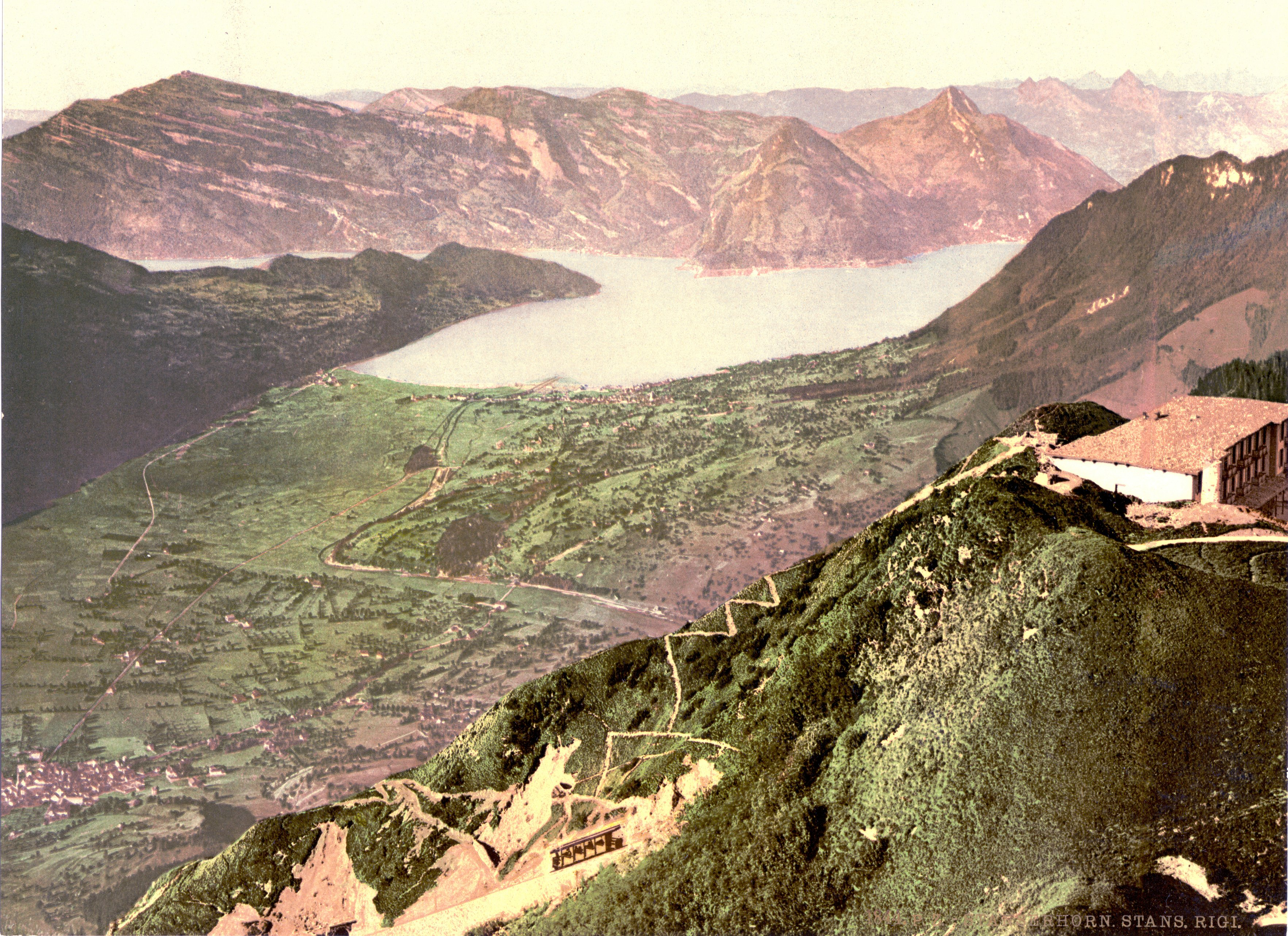 Das Stanserhorn mit der alten Standseilbahn, Stans und dem Vierwaldstättersee um 1900